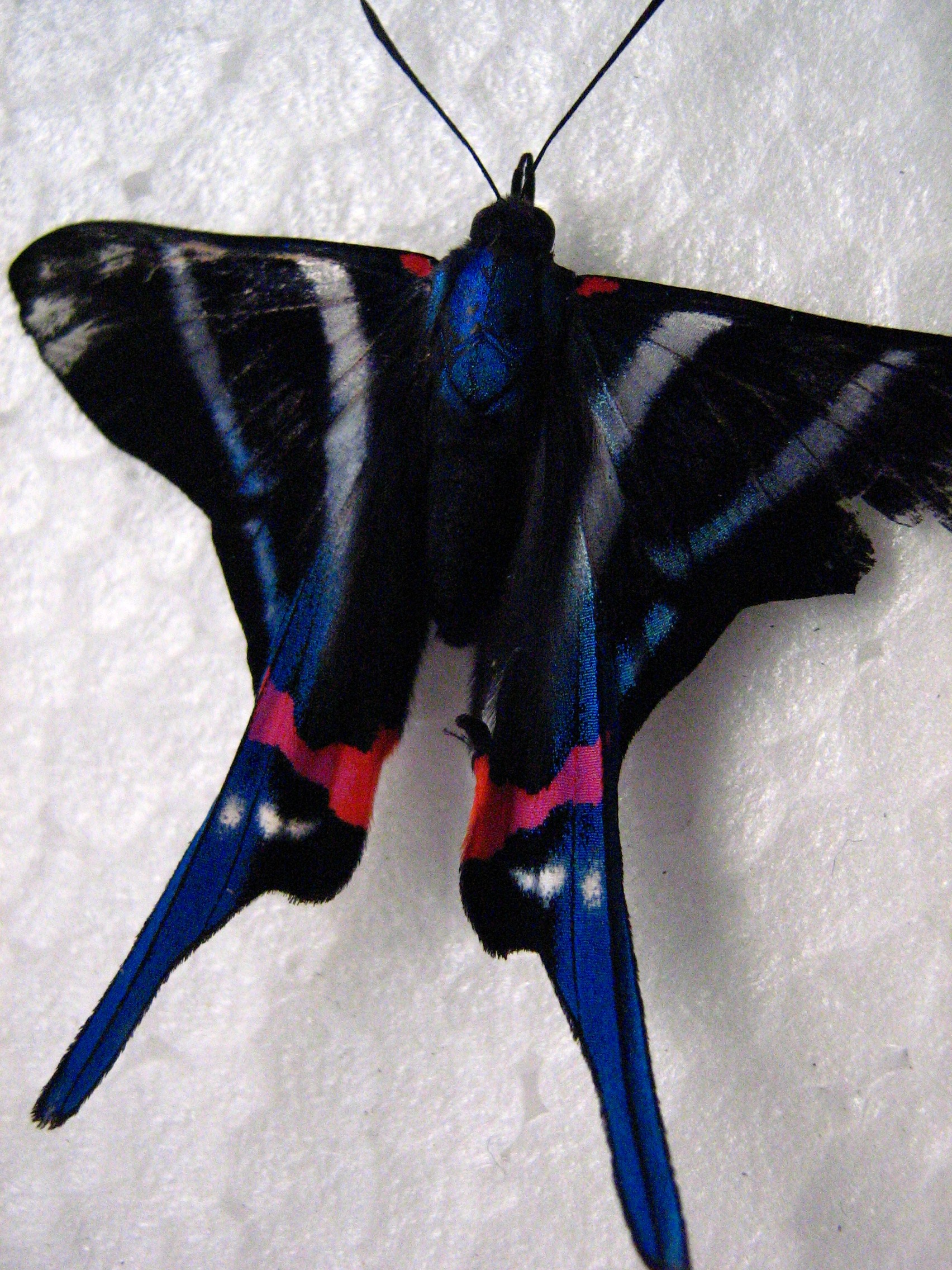 Rhetus arcius (Linnaeus, 1763) Calarcá, Quindio, Colombia